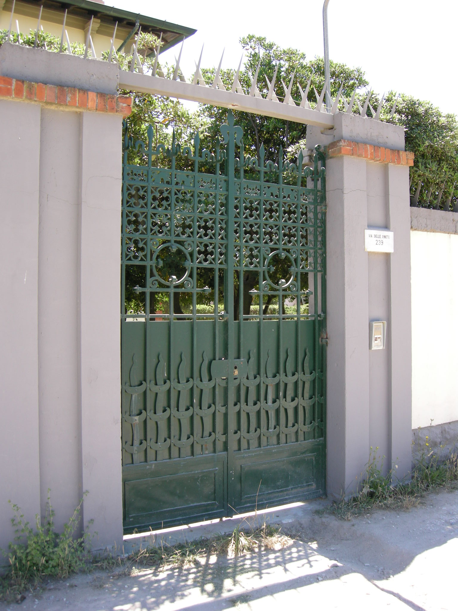 Villa Corsi, cancello